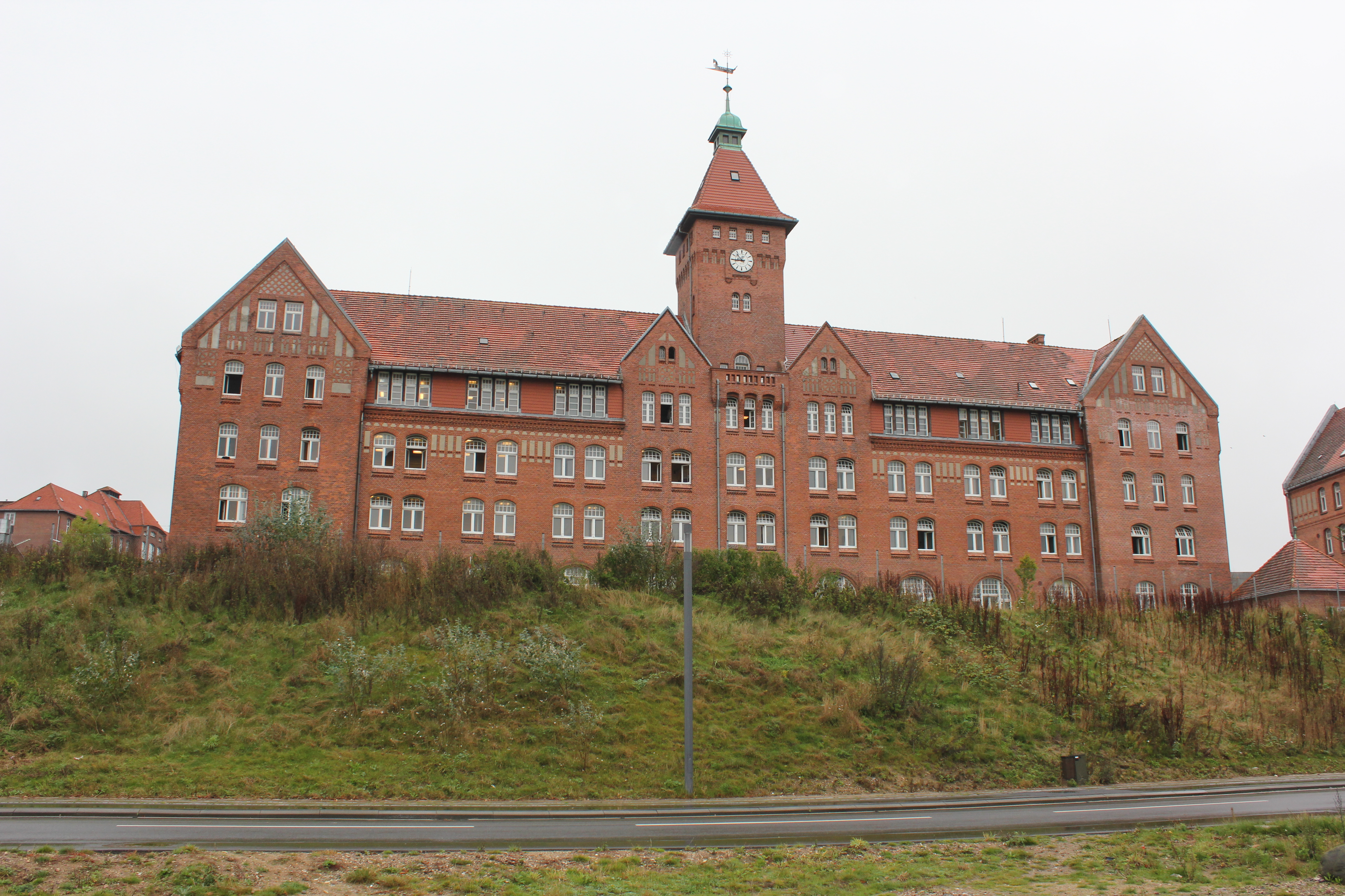 Sonderburg Kaserne, Gebäude mit dem Uhrenturm (2014), Bild 004